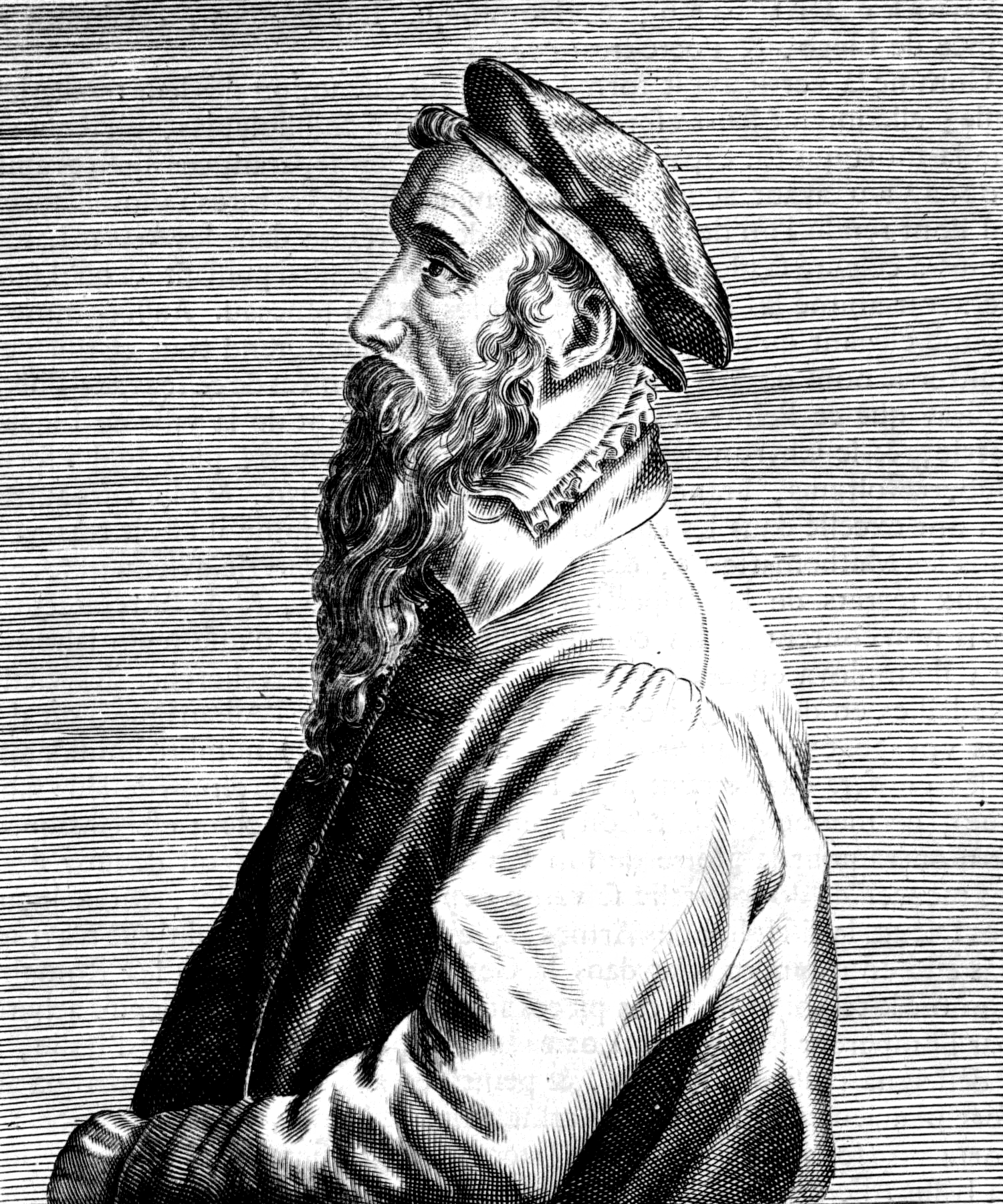 Nach Bruegels Tod erschienenes Porträt. Kupferstich ursprünglich aus: I. Bullart, Academie des Sciences et des Arts, 2. Band, 6. Abteilung, Amsterdam, 1682